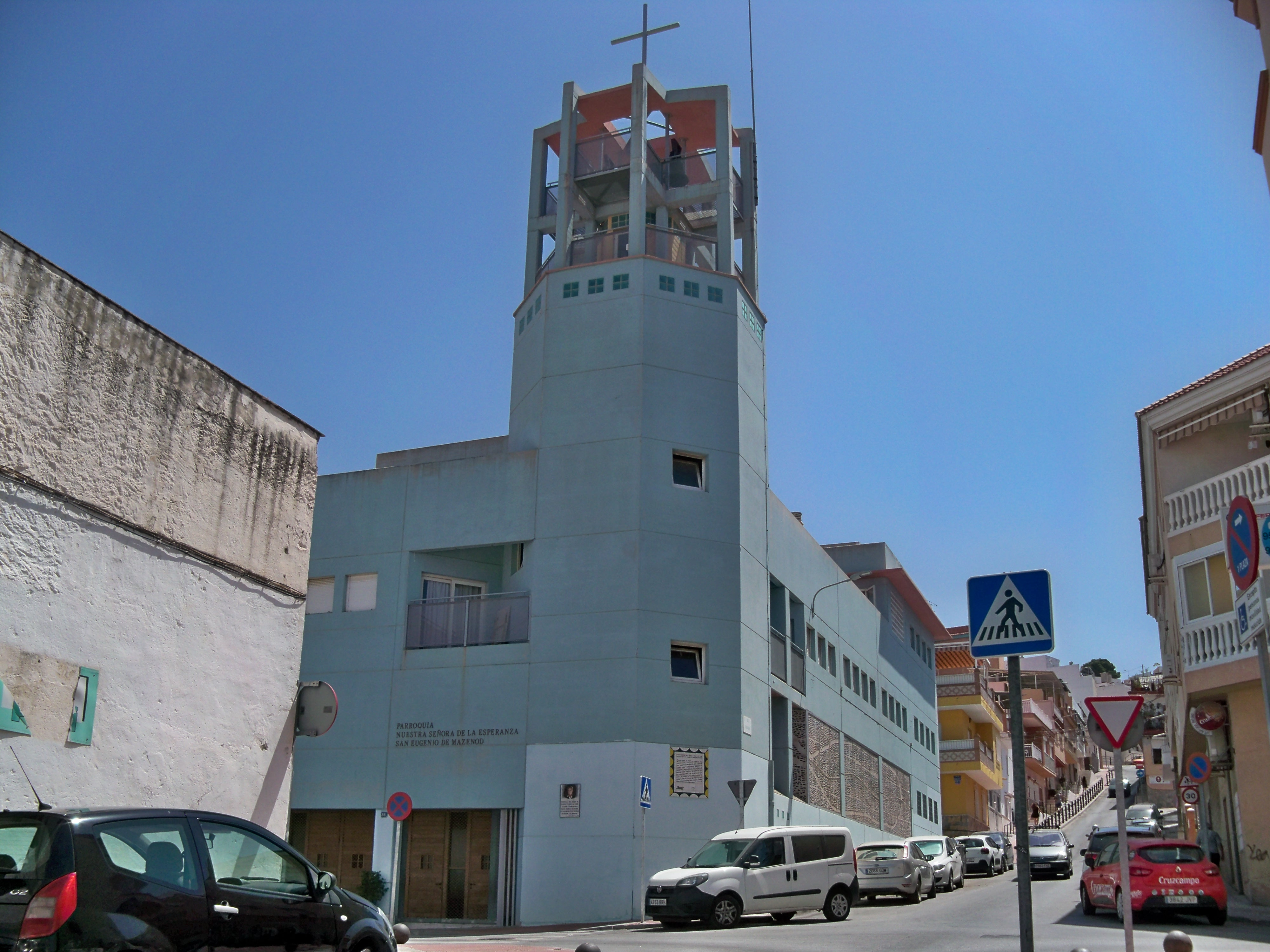 Parroquia Nuestra Señora de la Esperanza, Málaga, España.